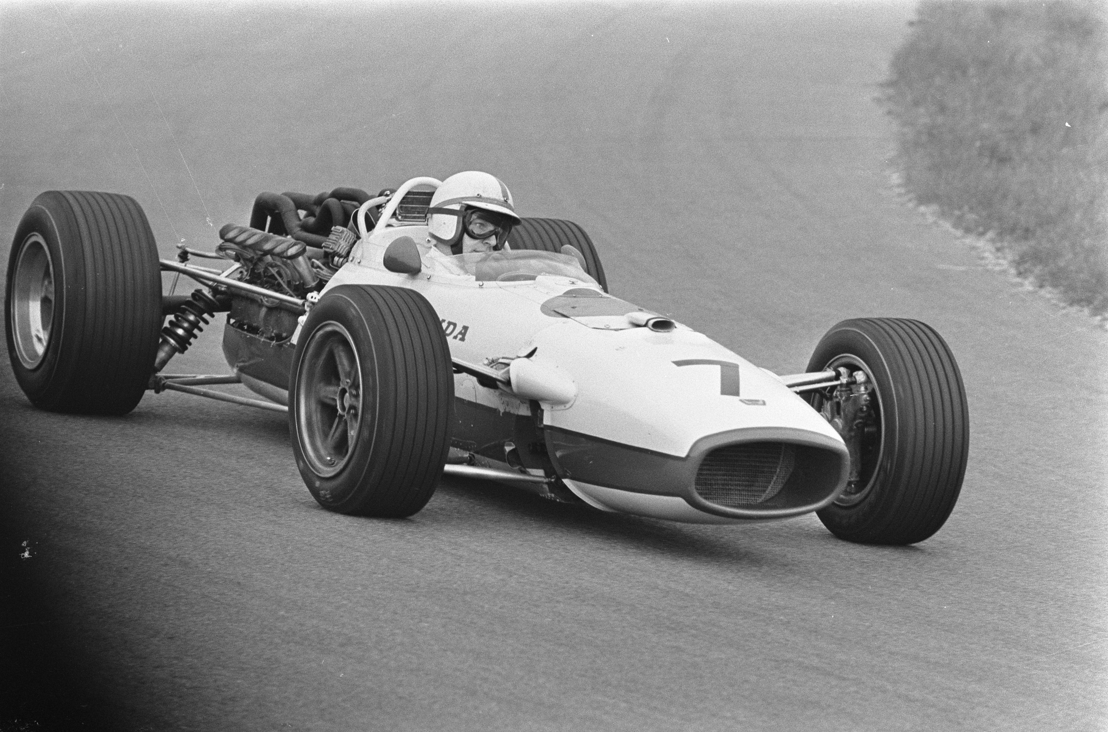 Training Grand Prix te Zandvoort.